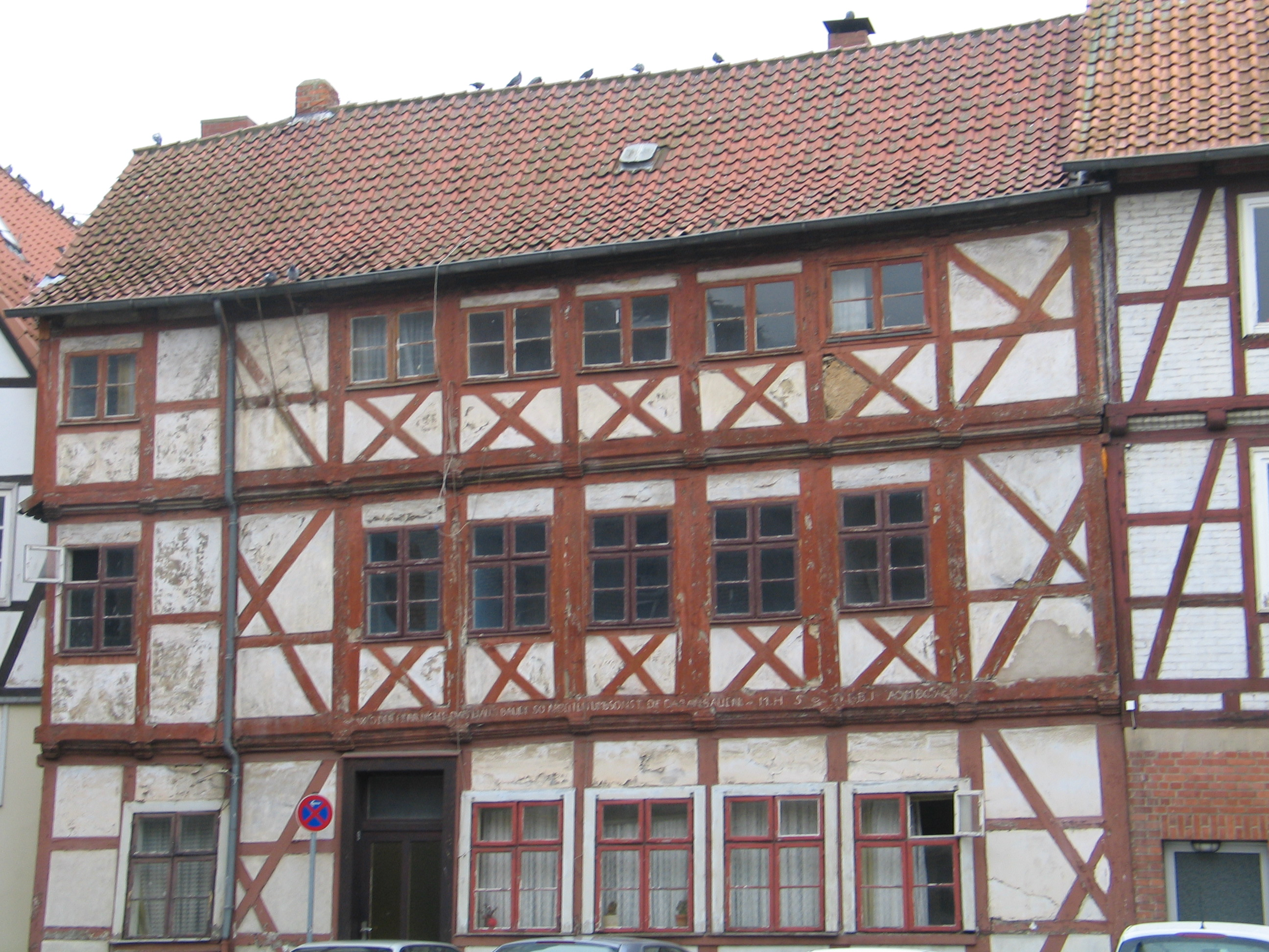 Haus am Ziegenmarkt in Wolfenbüttel